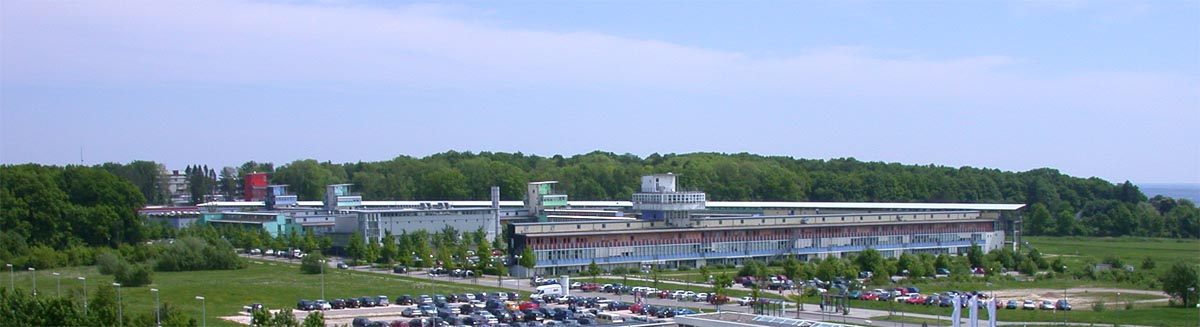 Universität Ulm (Gebäude der Ingenieurwissenschaftlichen Fakultät) - Architekt: Otto Steidle - eigene Aufnahme Sommer 2002